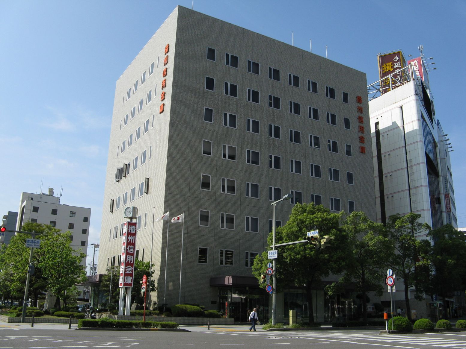 播州信用金庫本店